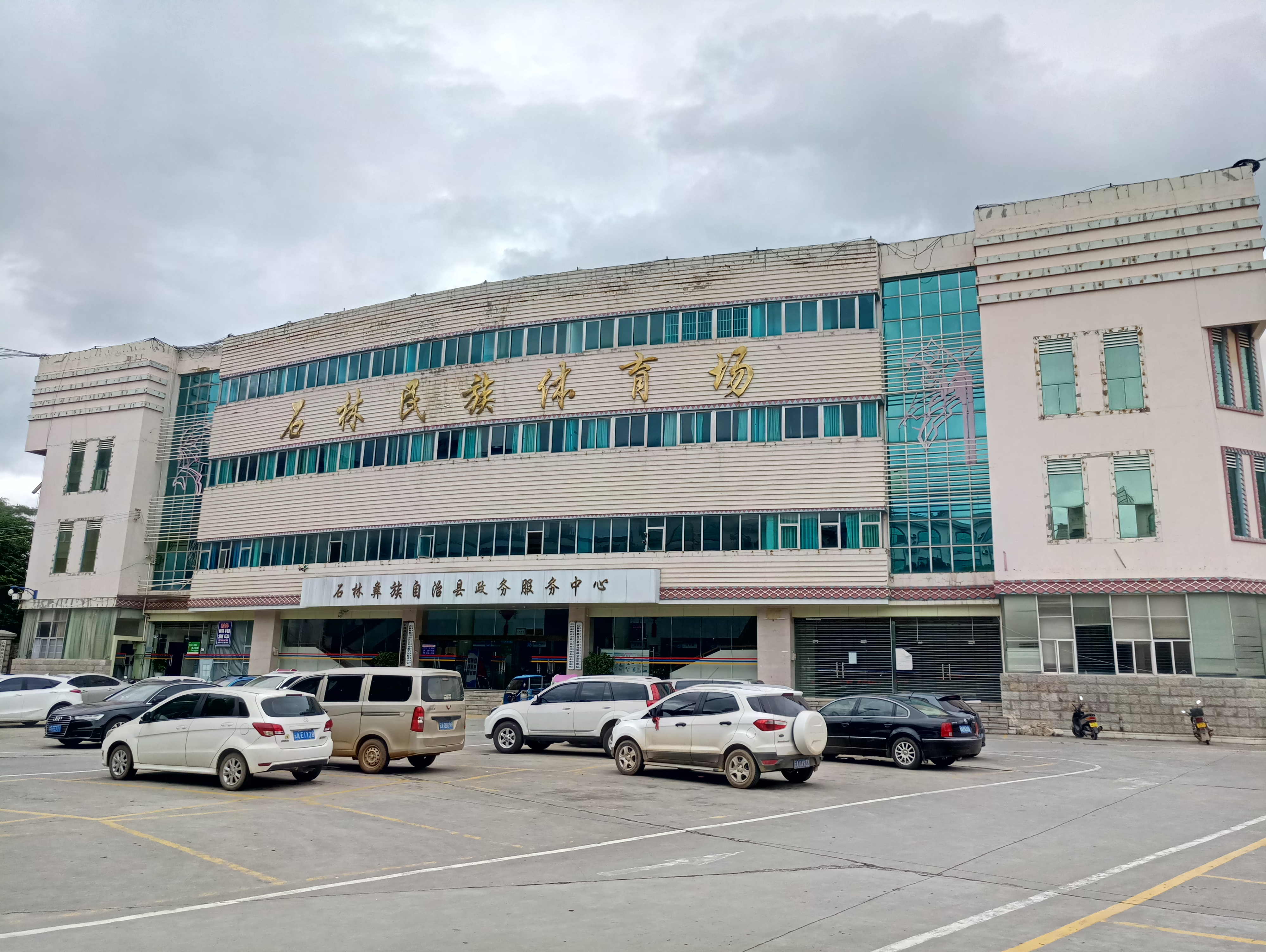 中文（中国大陆）: 石林民族体育场